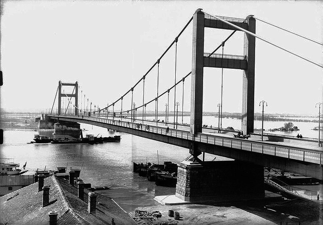 Most kralja Aleksandra, gradnja započeta 1930, otvoren 1934, srušen 1941 u aprilskom bombardovanju